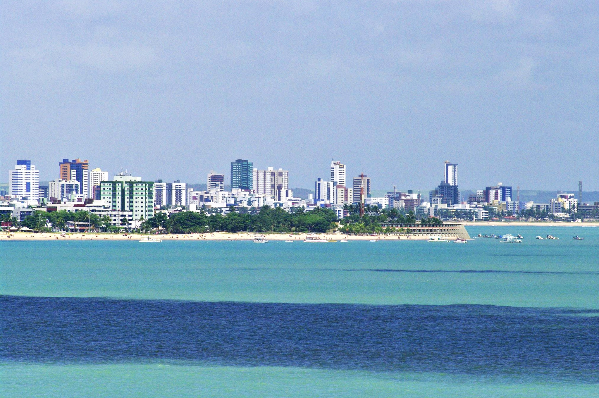 João Pessoa, capital do Estado da Paraíba, Brasil.